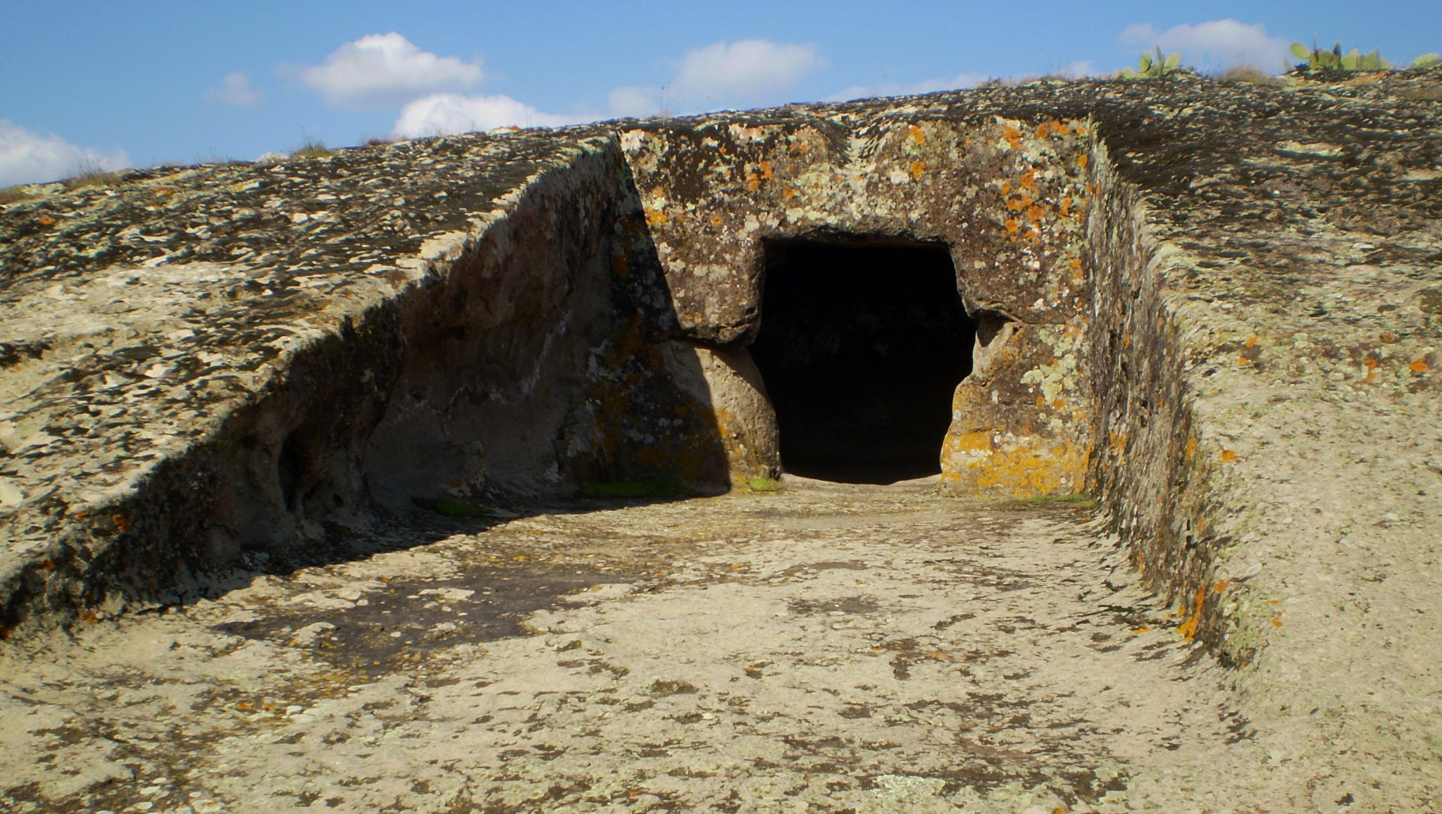 Domus de janas "Genna Salixi" - Villa Sant'Antonio (OR)